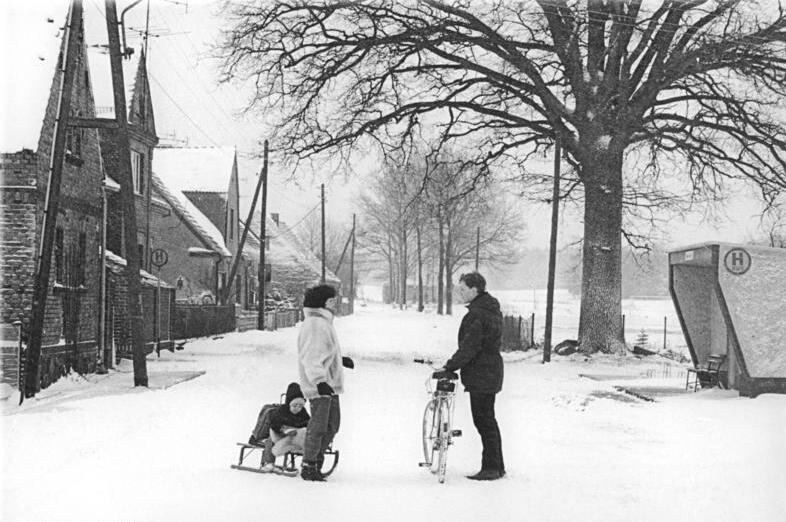 Klein Loitz, Dorfstraße, Winter ADN-ZB Weisflog 2.1.1987 Bez. Cottbus: Klein Loitz-Ein Patendorf der FDJ entwickelt sich-Mit der Jugendinitiative kamen 10 Mädchen und Jungen ins Dorf. Einige von ihnen bekamen im neuerbauten Reihenhaus der LPG eine Wohnung. Zwischen allen gibt es einen guten Kontakt. -siehe auch 1987-0122-6 und 7N